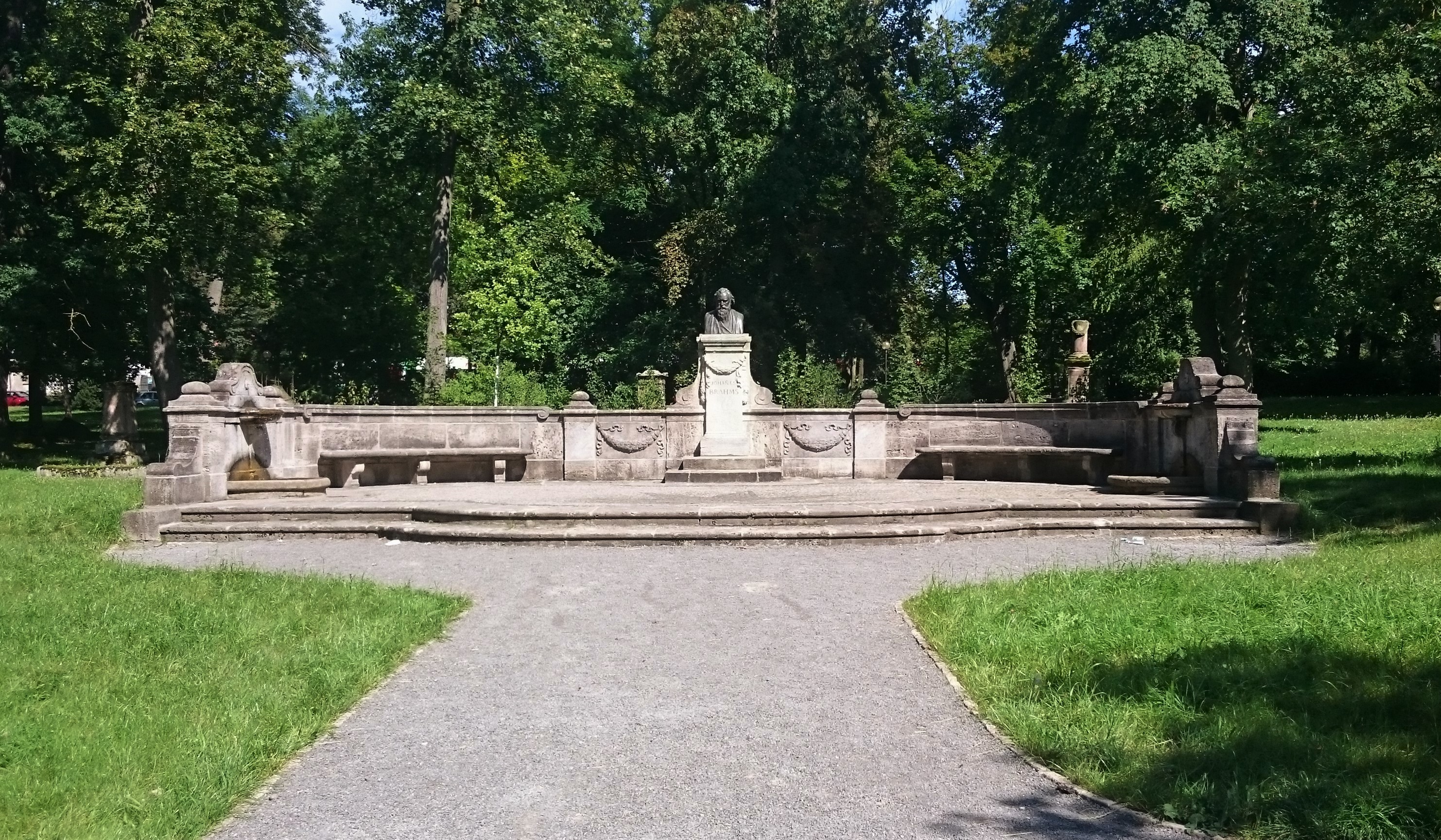 Denkmalanlage Johannes Brahms in Meiningen, erbaut 1899.